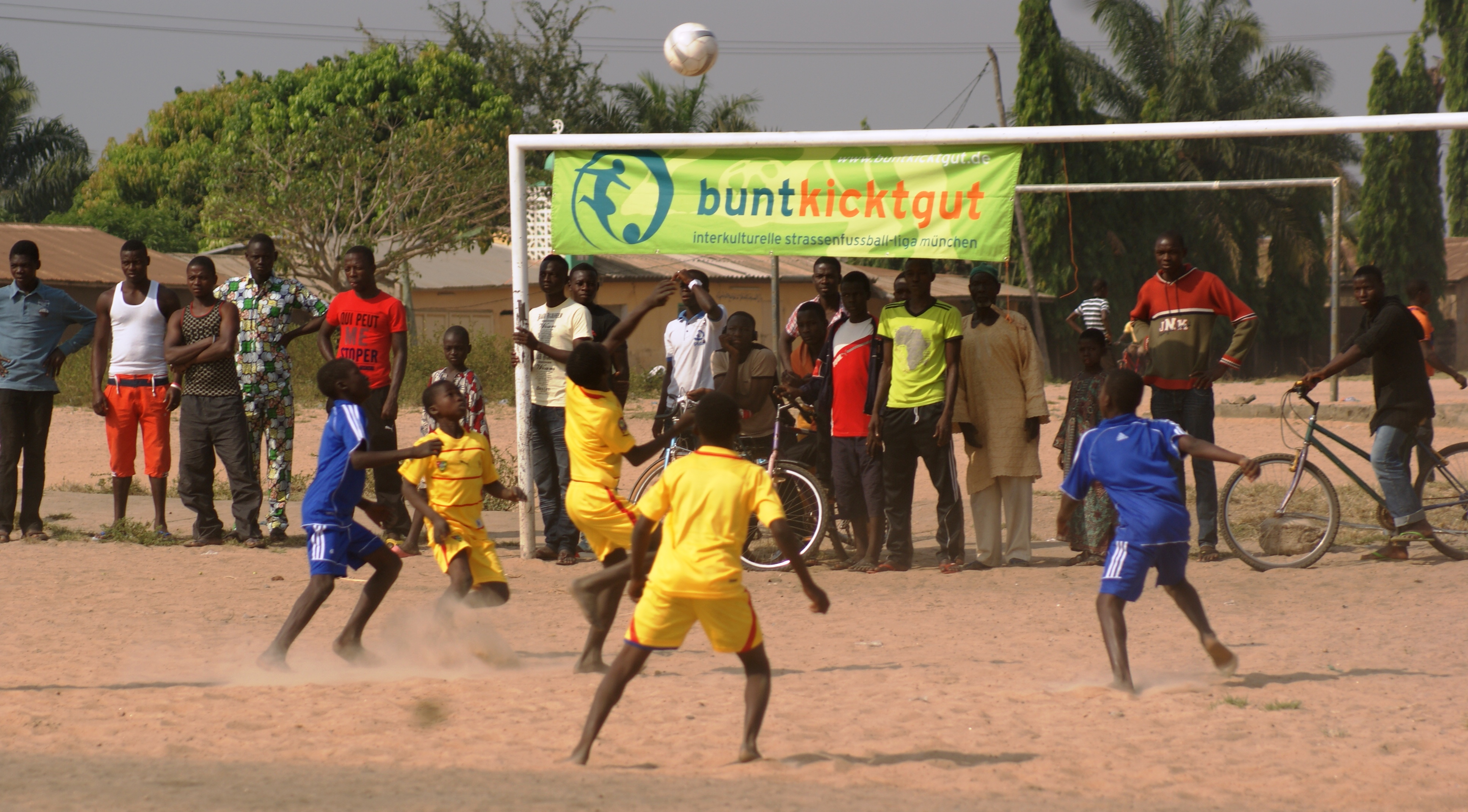 Mit den Teilnehmern in ihre Heimatländer – buntkicktgut beim „Coupe de l´amité“ in Sokodé, Togo.